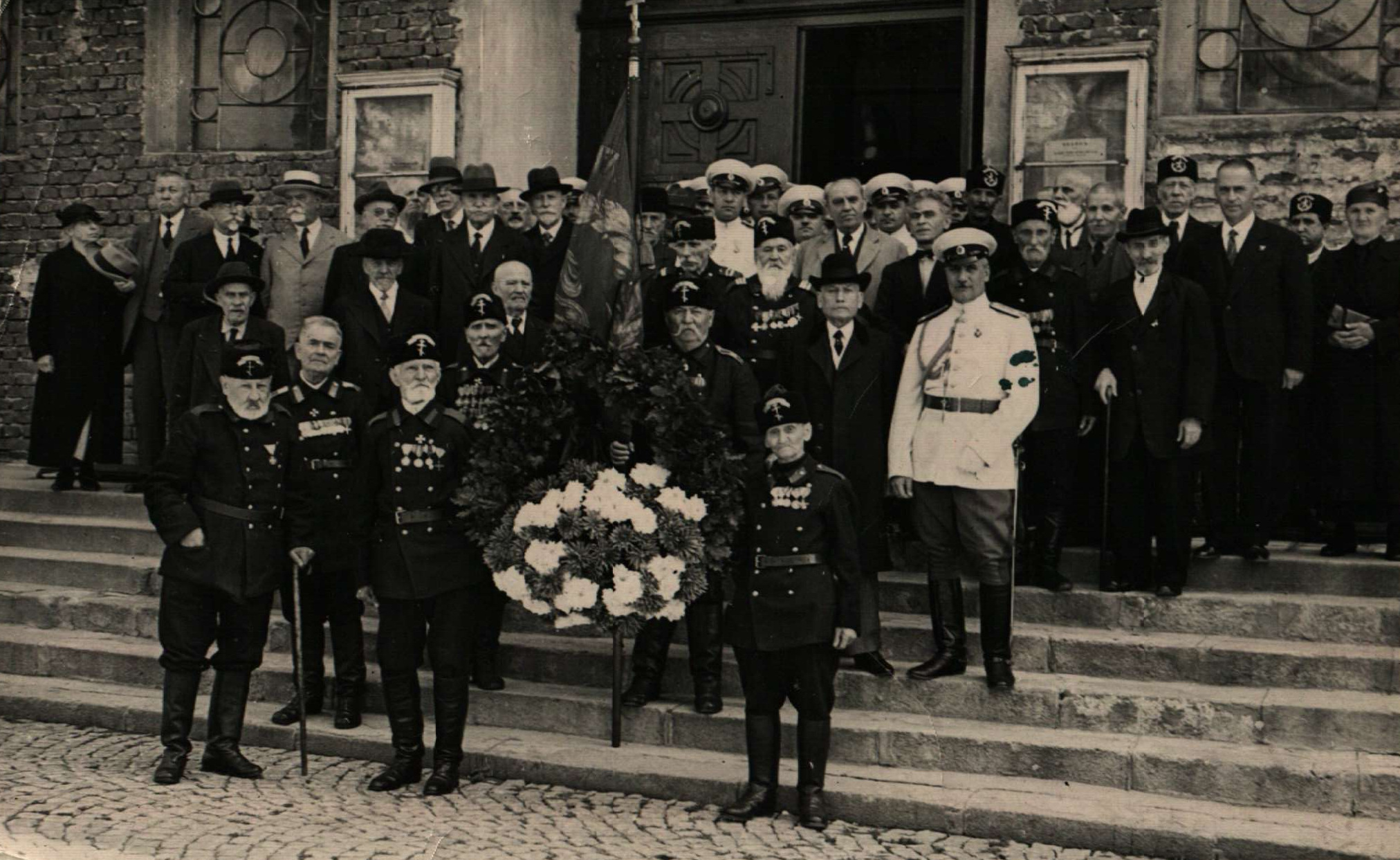 Снимка на участници в тържество по случай 3 март - опълченци, участници в Македоно-одринското опълчение, военни и цивилни.